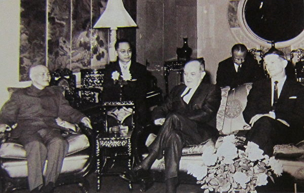 中文（台灣）: 1969年10月中華民國前總統蔣中正(左)在士林官邸接見美國國務卿魯斯克（中），右一為美國駐華大使馬康衛。外交部科長錢復翻譯，湯武司長（後排右一）記錄（許捷芳）。（鍾元翻攝/大紀元）